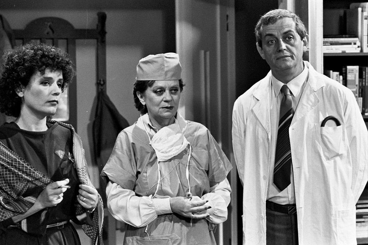 צוות תוכנית הטלוויזיה קרובים קרובים של הטלוויזיה הלימודית חנה מרון אילן דר וליאורה ריבלין כרופאים